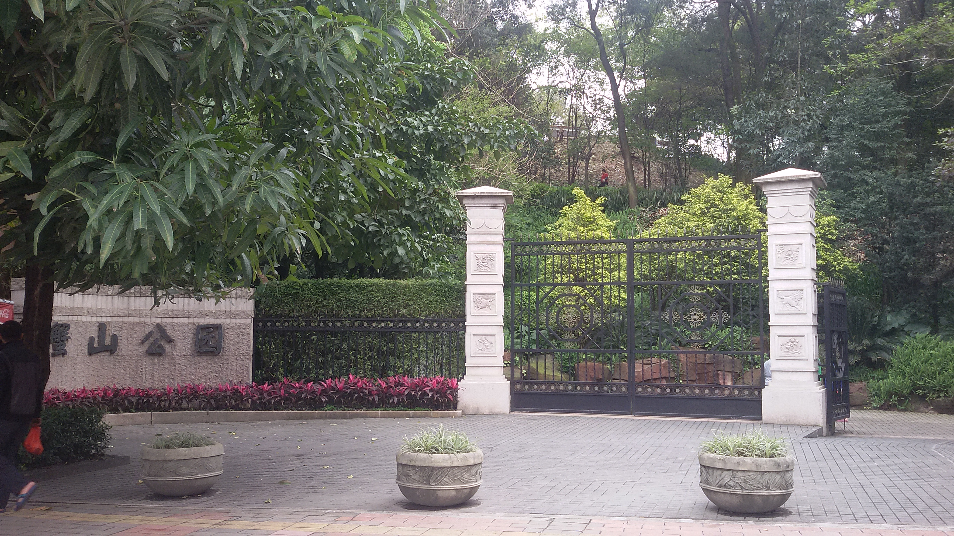 粵語: 蠏山公園正门